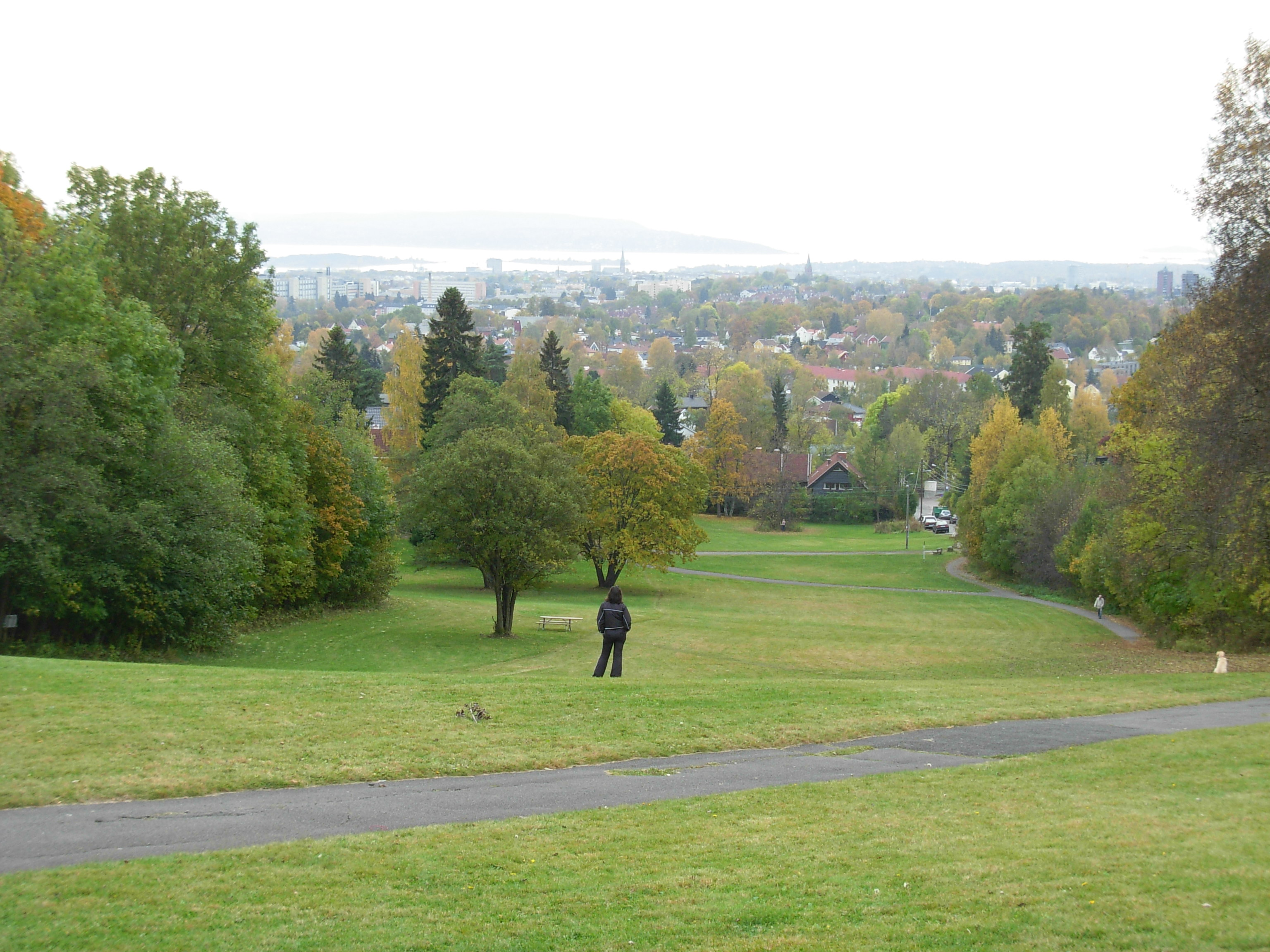 Korsvollparken_mot_byen_og_fjorden